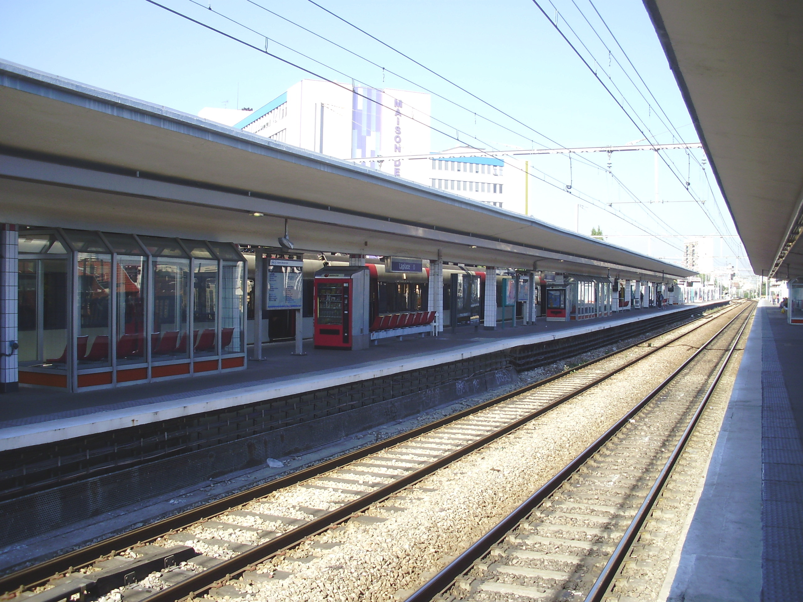 Gare de Laplace, à Arcueil, Val-de-Marne, France (vue vers Paris depuis l'extrémité sud du quai pour Robinson/Saint-Rémy-lès-Chevreuse)